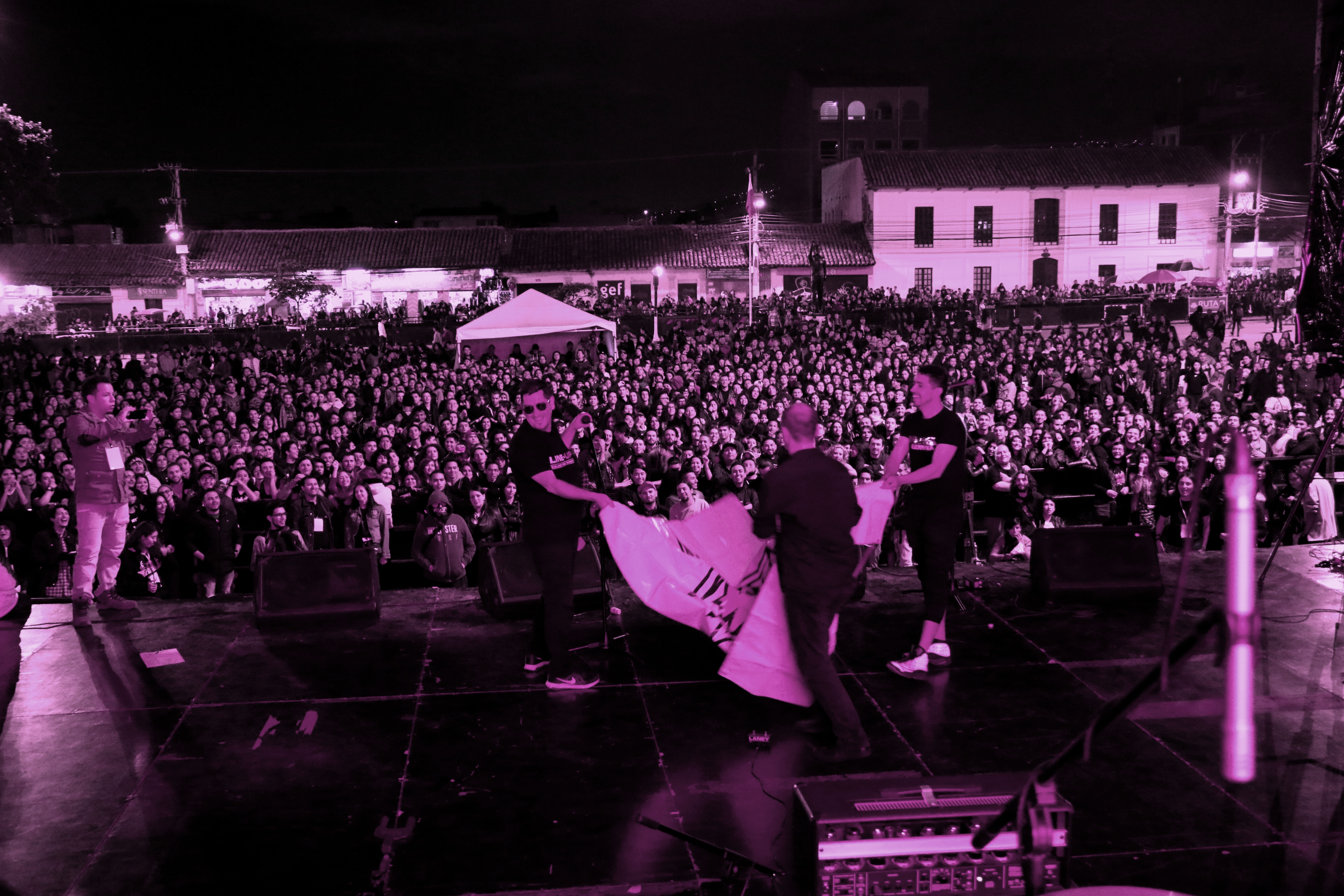 Darkness en Xua Rock Fest 2016